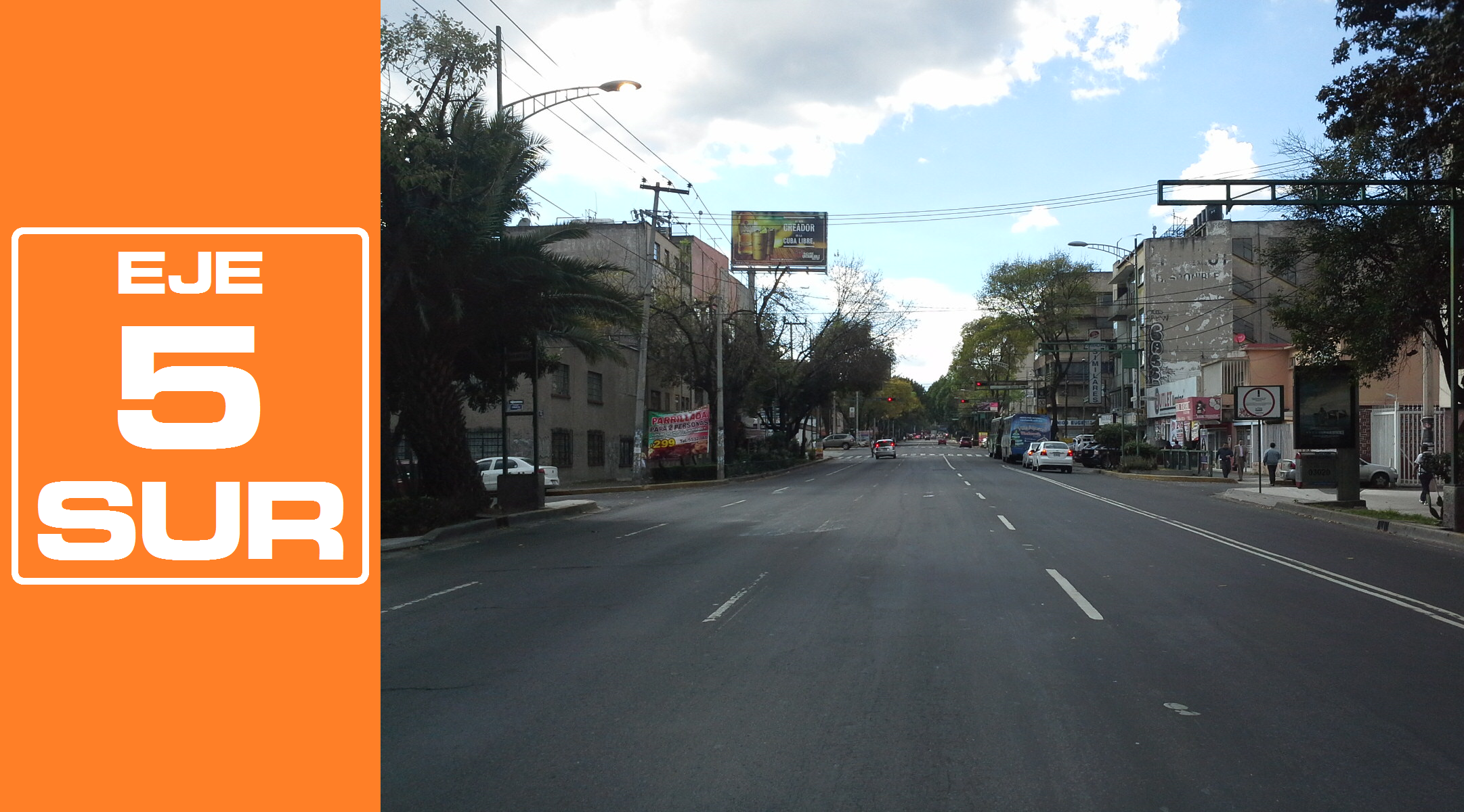 Rediseñado original de la señalética de los Ejes viales de la Ciudad de México por José García (Wiki ID: narumiyama)